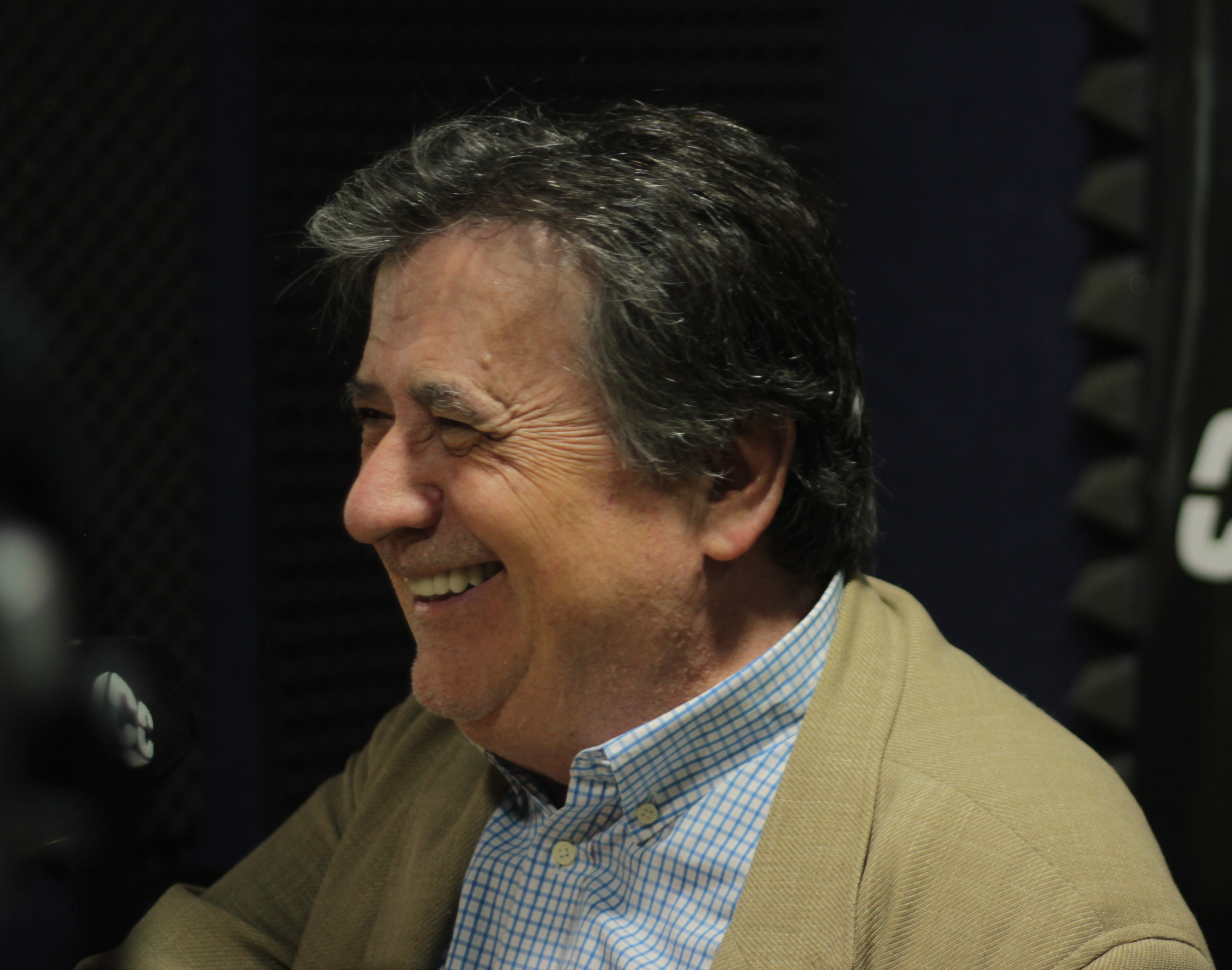 Luis Landero en el programa radiofónico Carne Cruda